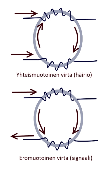 Kuristimen toiminta yhteismuotoiselle häiriövirralle. Eromuotoiselle signaalille kuristin näkyy pienenä impedanssina, kun taas yhteismuotoiselle virralle kuristin näkyy induktanssina, joten se suodattuu.